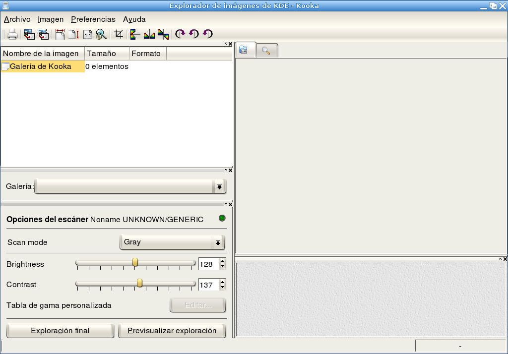 Kooka snapshot (spanish), v. 044